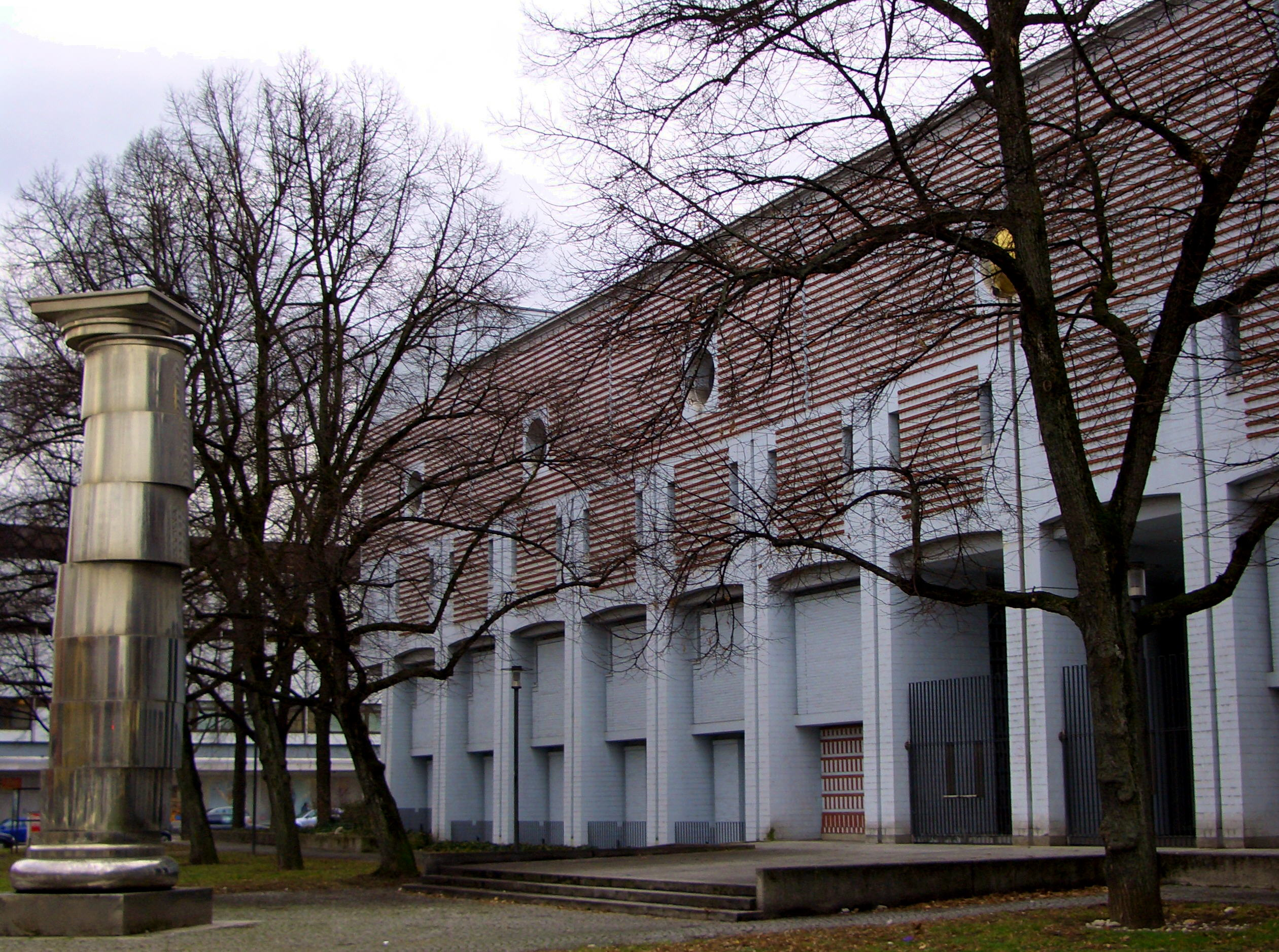 Stadtarchiv München von Nordost